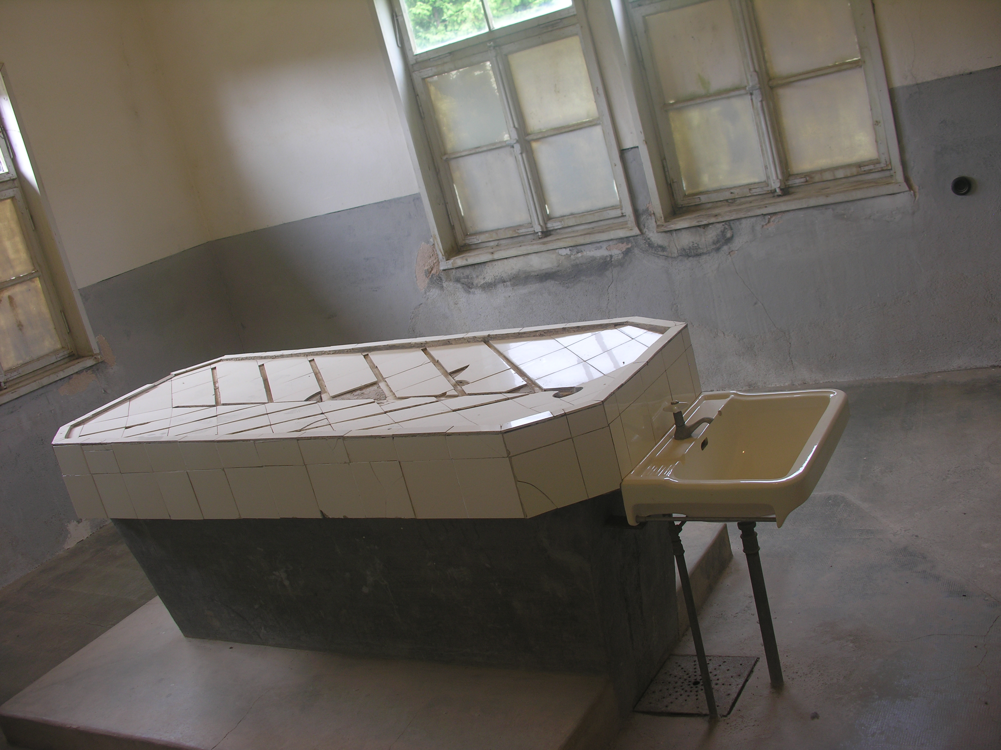 Table de vivisection du camp de concentration de Natzweiler-Struthof